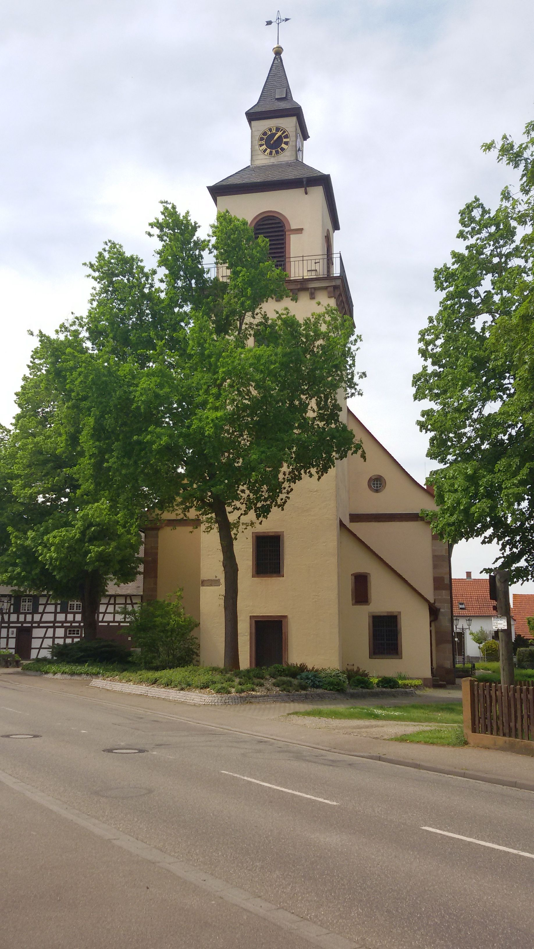 Blick von der Hauptstraße nördliche Seite